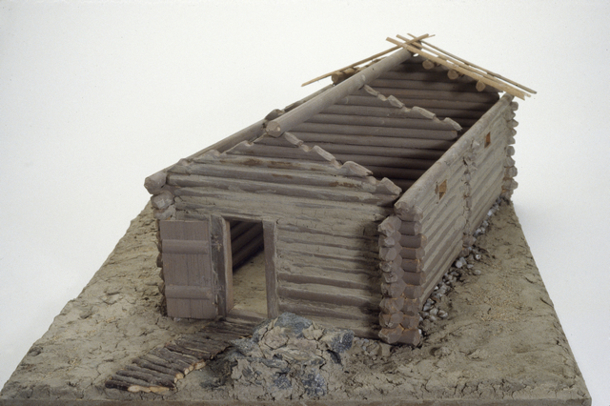 Hämeenlinnan Varikkoniemen ristiretkiaikaisen talon rekonstruktio